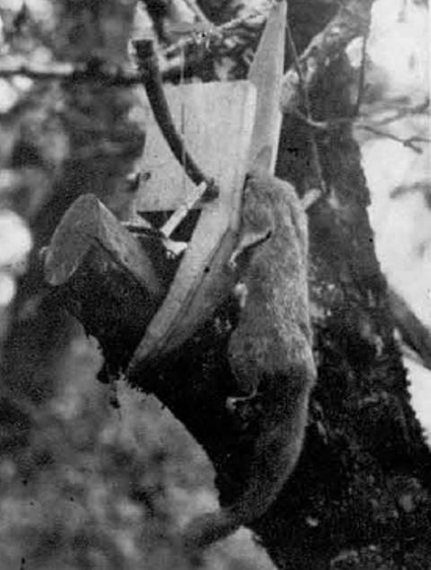 Lov na polhe v Sloveniji- Stara dolenjska polšja past na bukvi z ujetim polhom.